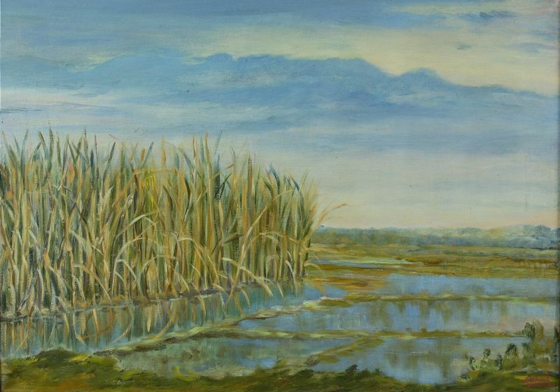 Olieverfschilderij. Verdronken riet in Mojokerto